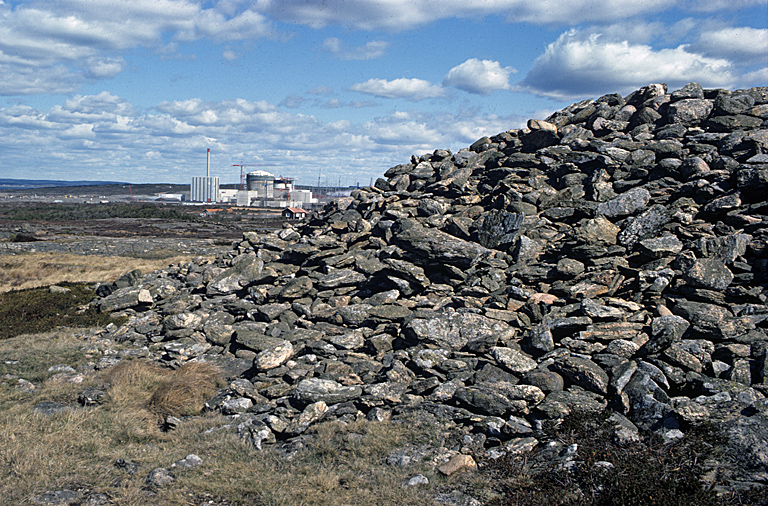 Bronsåldersröse i förgrunden, RAÄ-nummer Värö 21:1, inom Biskopshagens naturreservat. Ringhals kärnkraftverk i bakgrunden. Bilden troligen från mitten av 1970-talet. Motiv: Värö 21:1 Nyckelord: Naturreservat, Riksintressen Kategori: Röse, Kraftverk Bronsåldersröse i förgrunden, RAÄ-nummer Värö 21:1, inom Biskopshagens naturreservat. Ringhals kärnkraftverk i bakgrunden. Bilden troligen från mitten av 1970-talet. Värö 21:1.